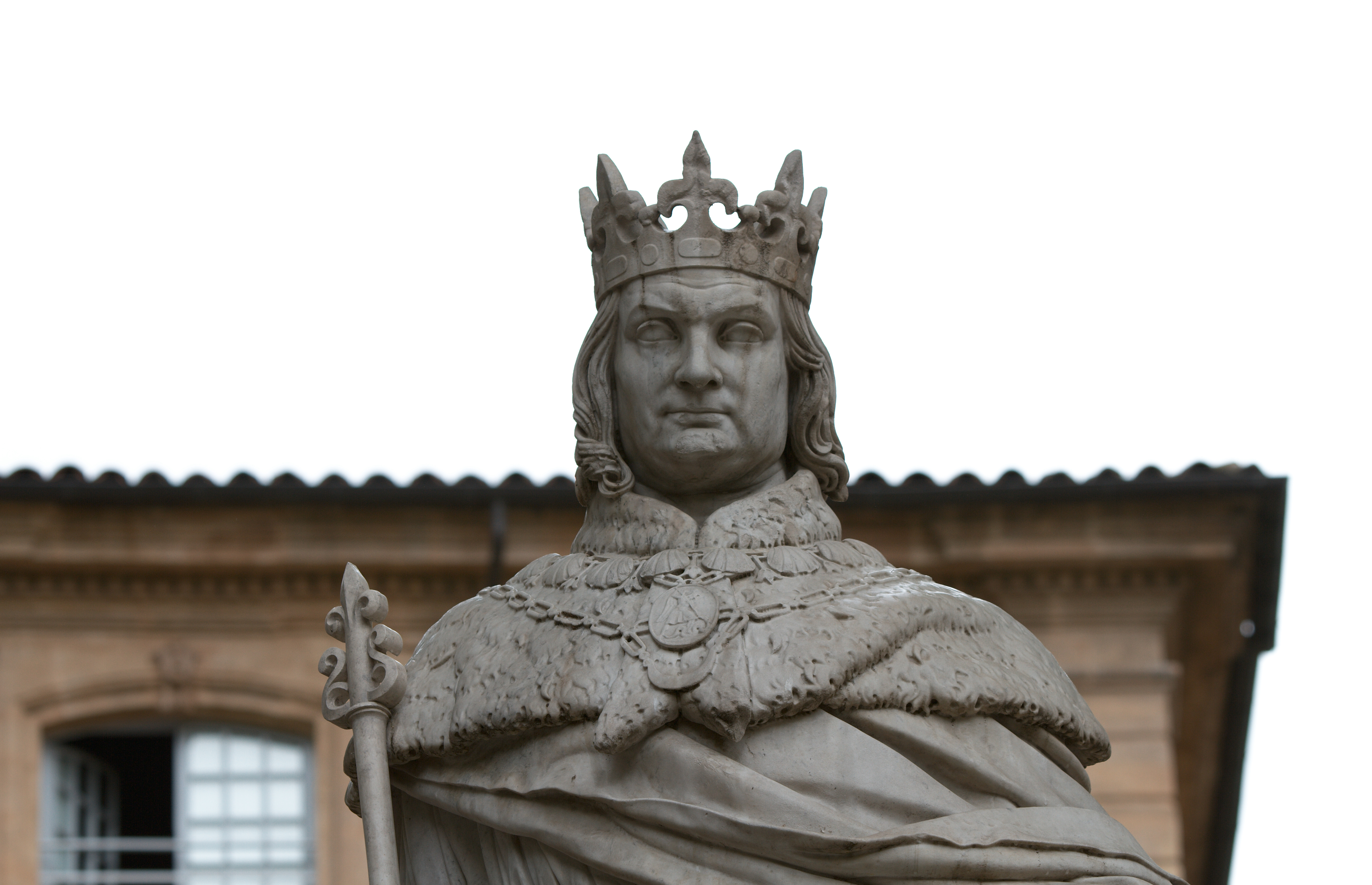 René Ier de Naples, Aix-en-Provence (France).